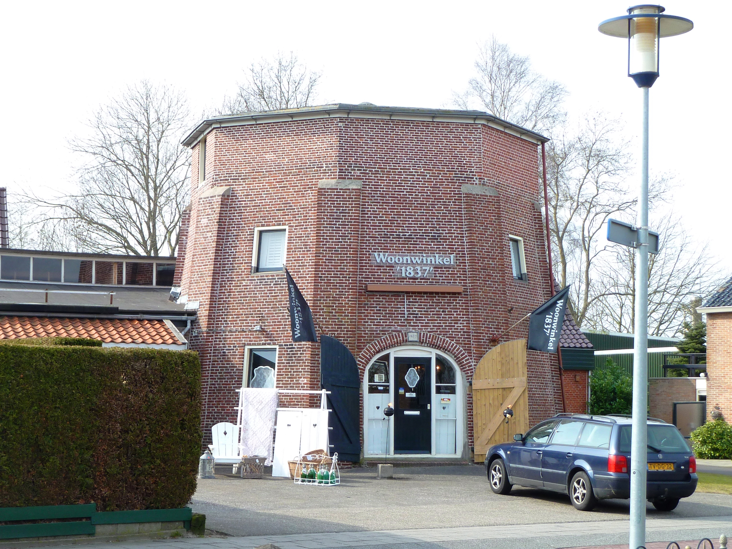 Voormalige korenmolen in het dorp Marum (Groningen, Nederland). Gebouwd in 1837 ter vervanging van de oude standerdmolen die hier reeds voor 1616 stond en het jaar ervoor bij een orkaan omwaaide en 'verpletterd' werd. De molen vloog in brand in 1928 en werd daarna vervangen door een electromotor. Later was er een administratiekantoor en een reisbureau gevestigd. Sinds 2007 is er een woonwinkel gevestigd.